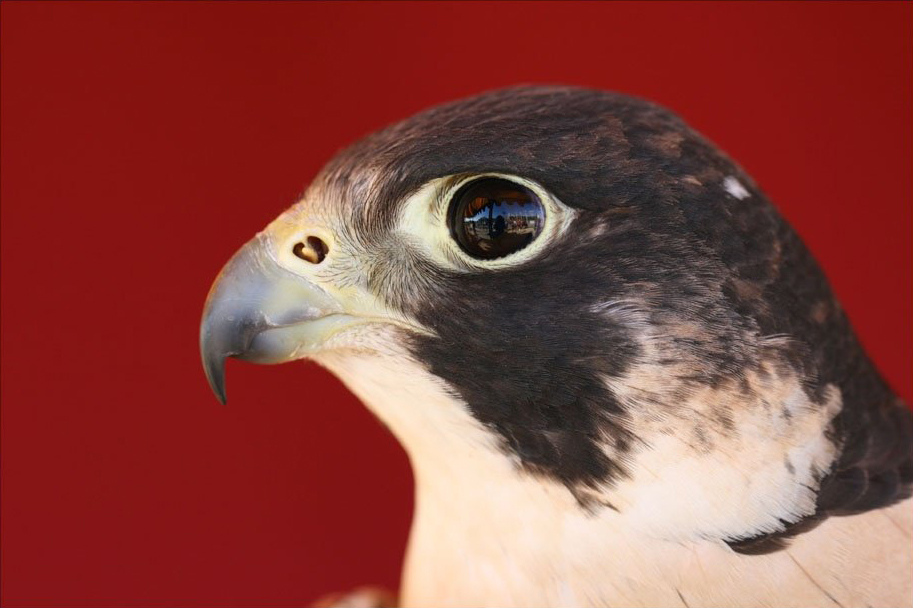 Falco eleonorae Valencia, Spain